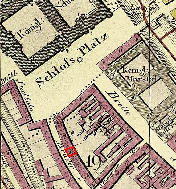 Lageplan des ehemaligen Berliner Hotels "König von Preußen" in der Brüderstraße 39a.